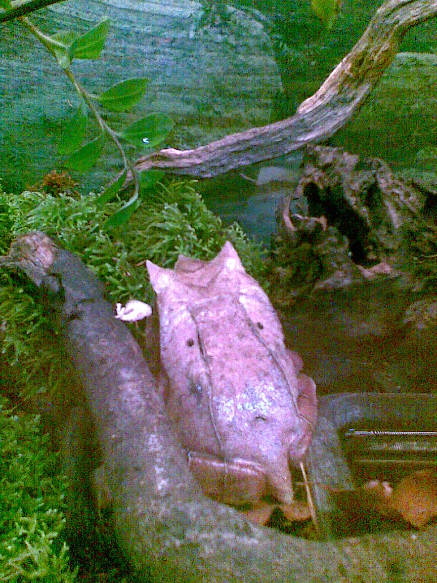 Rückenansicht eines Zipfelfrosches (Megophrys nasuta)